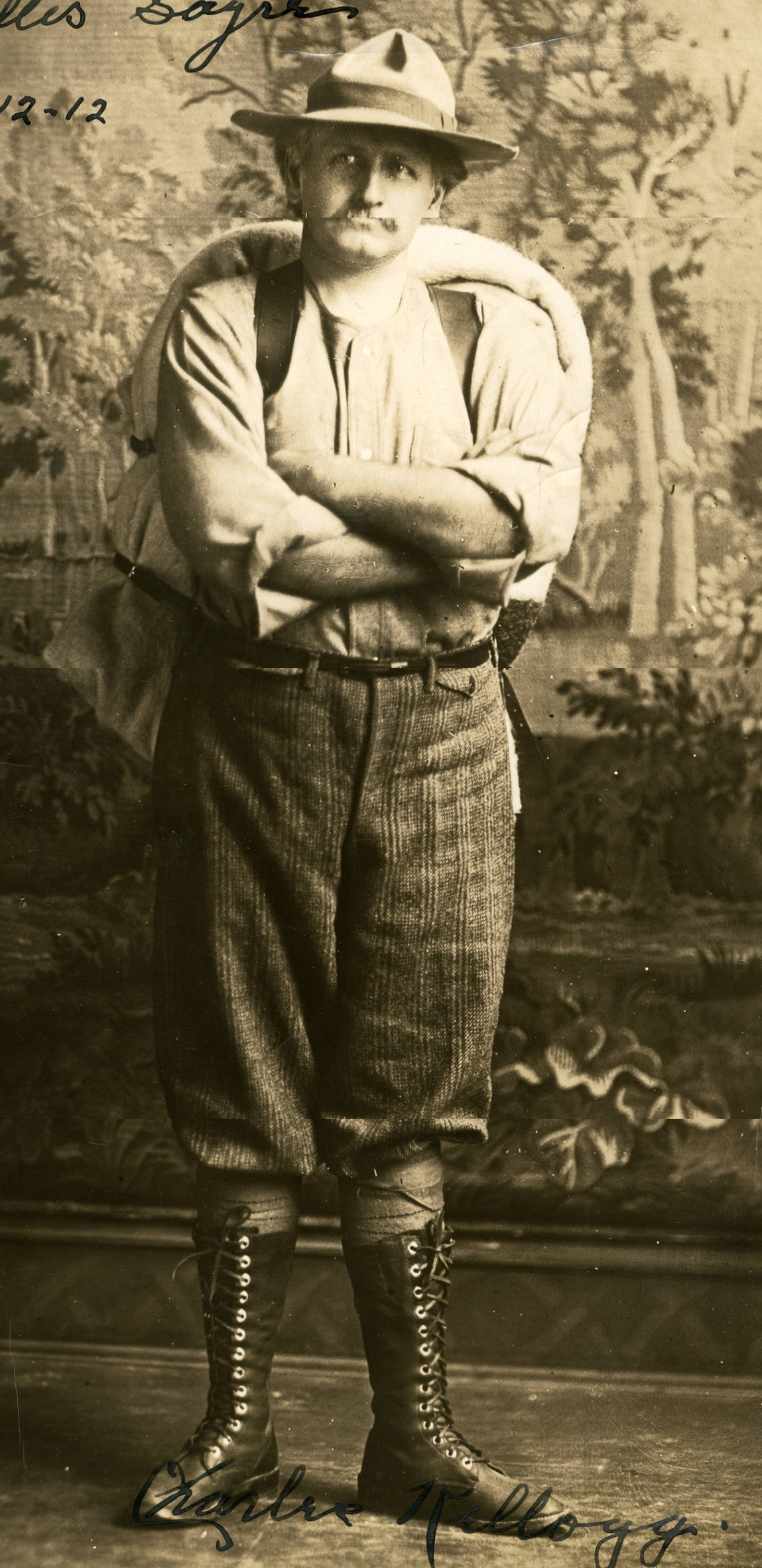 Charles Kellogg vaudeville entertainer